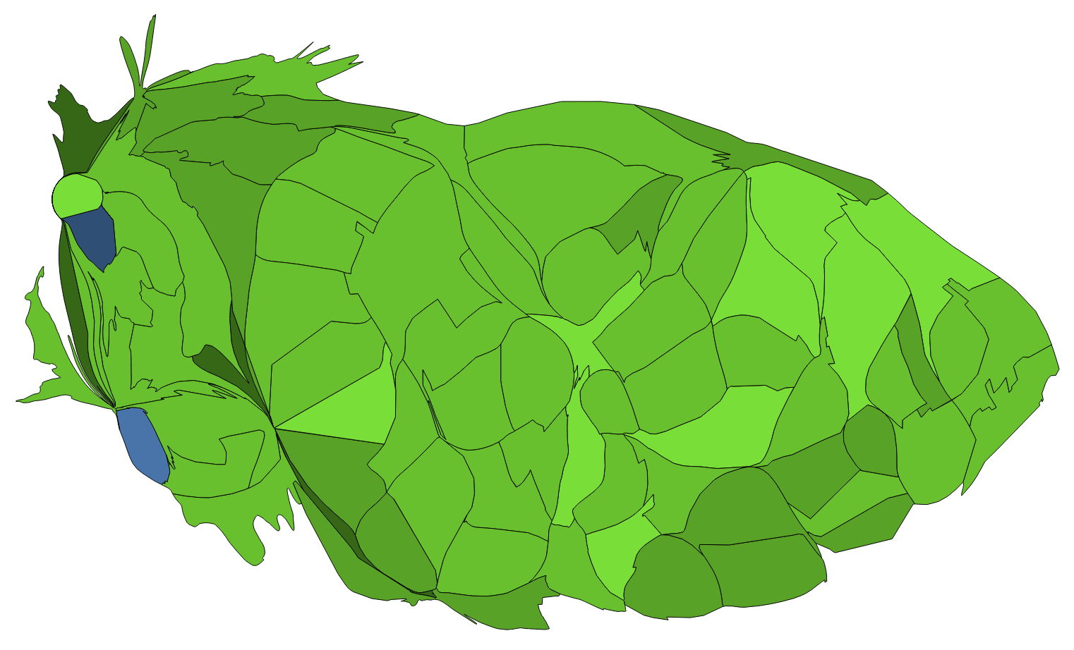 顏色對照表